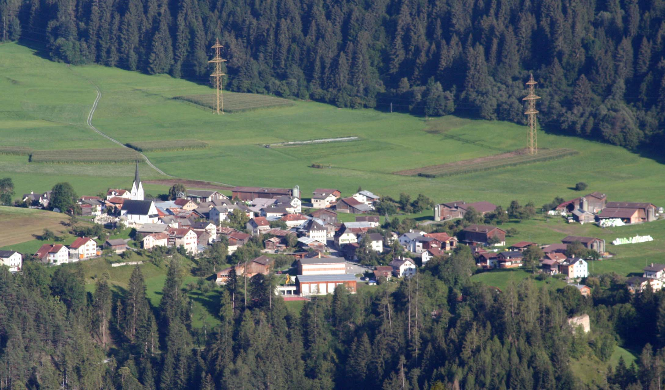 Valendas, von Falera aus gesehen